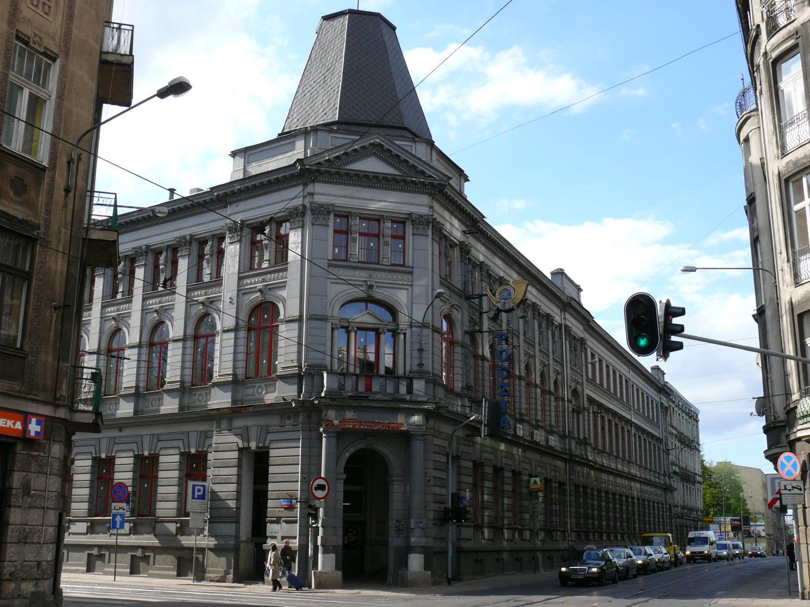 Poczta Główna w Łodzi